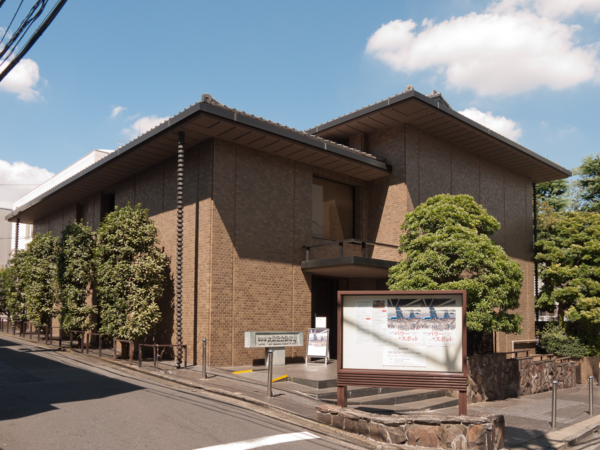 太田記念美術館、東京都渋谷区神宮前。